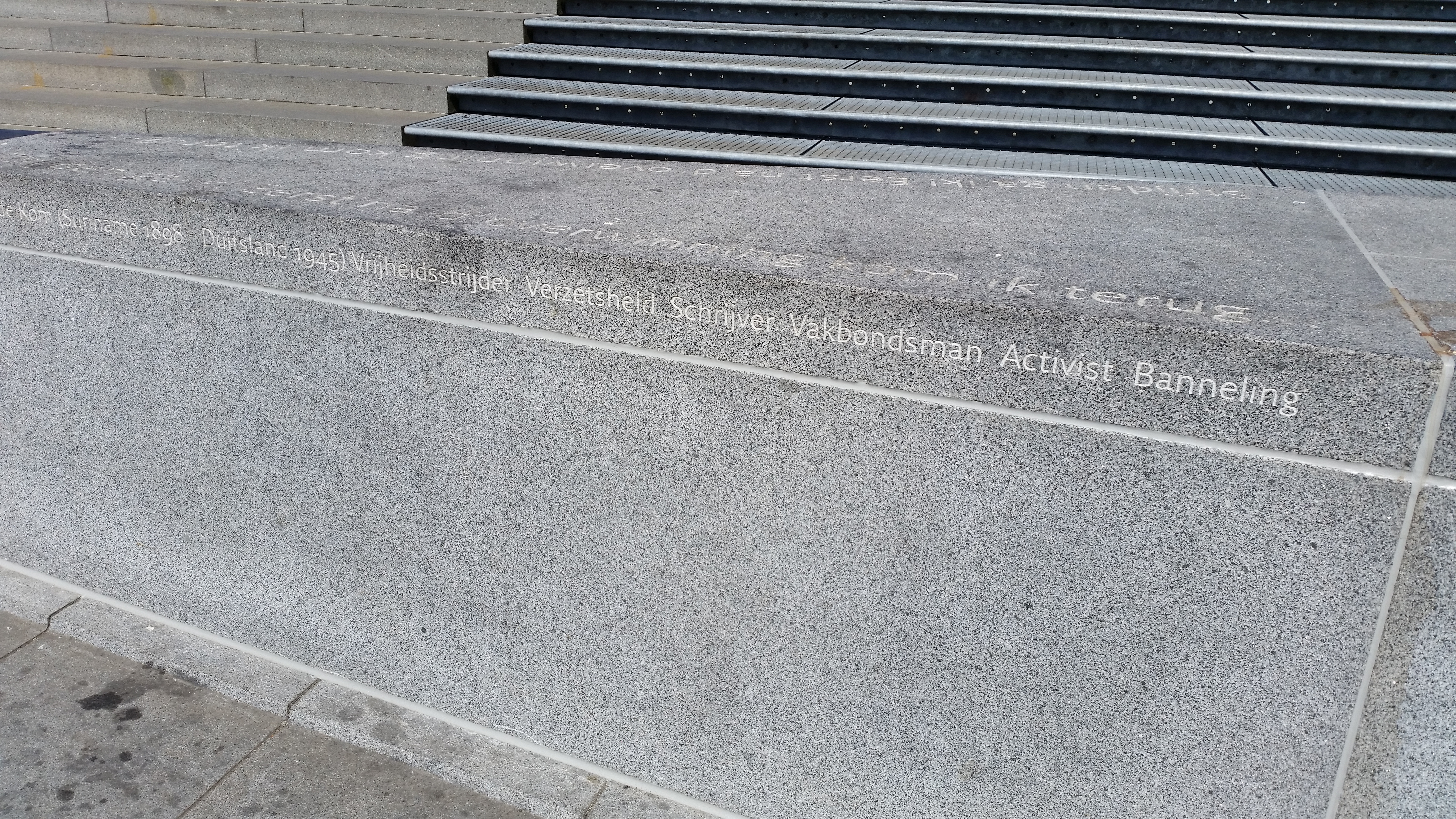 Impressie van het Monument voor Anton de Kom, Anton de Komplein in Amsterdam Zuidoost